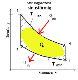 Skizze P_V Diagramm